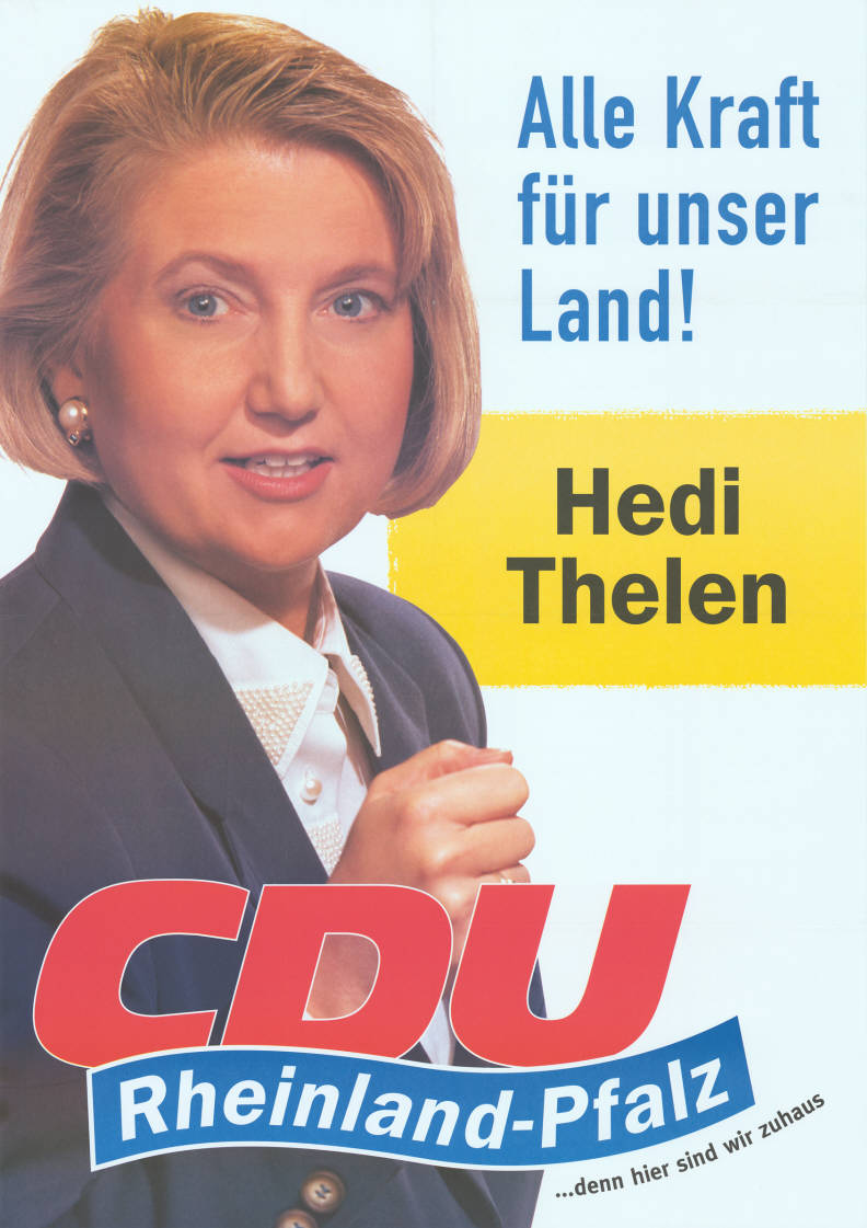 Alle Kraft für unser Land Hedi Thelen CDU Rheinland-Pfalz ... denn hier sind wir zuhaus Abbildung: Porträtfoto mit geballter Faust Plakatart: Kandidaten-/Personenplakat mit Porträt Auftraggeber: CDU Rheinland-Pfalz Objekt-Signatur: 10-010 : 925 Bestand: Landtagswahlplakate Rheinland-Pfalz ( 10-010) GliederungBestand10-18: Landtagswahlplakate Rheinland-Pfalz (10-010) » CDU Lizenz: KAS/ACDP 10-010 : 925 CC-BY-SA 3.0 DE